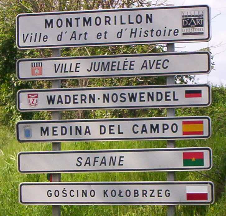 Panneau de jumelage de Montmorillon, Vienne, France (86)